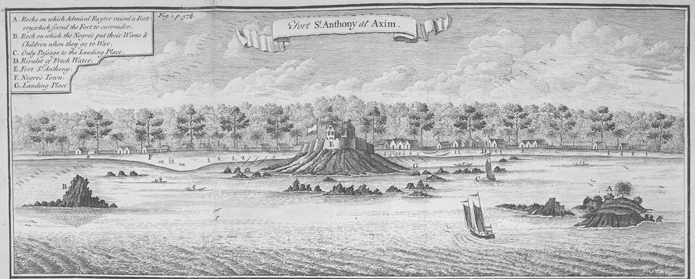 HIstorischer Kupferstich des Forts St. Anthony (Sao Antonio) in Ghana